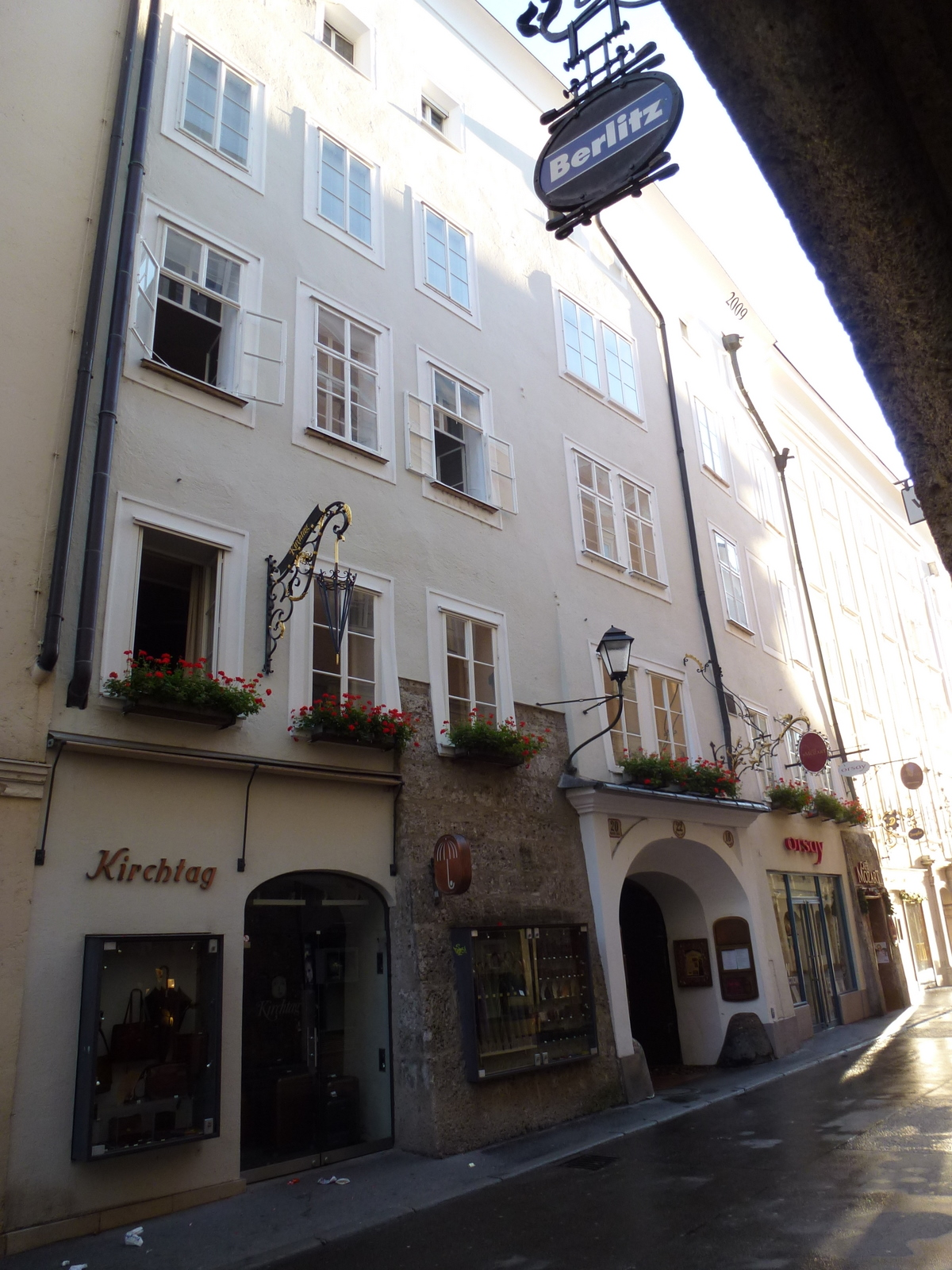 Salzburg, Altstadt: Haus Getreidegasse 22, Wohn- und Geschäftshaus, Niederleghaus (Achtung: falscher Dateiname!)